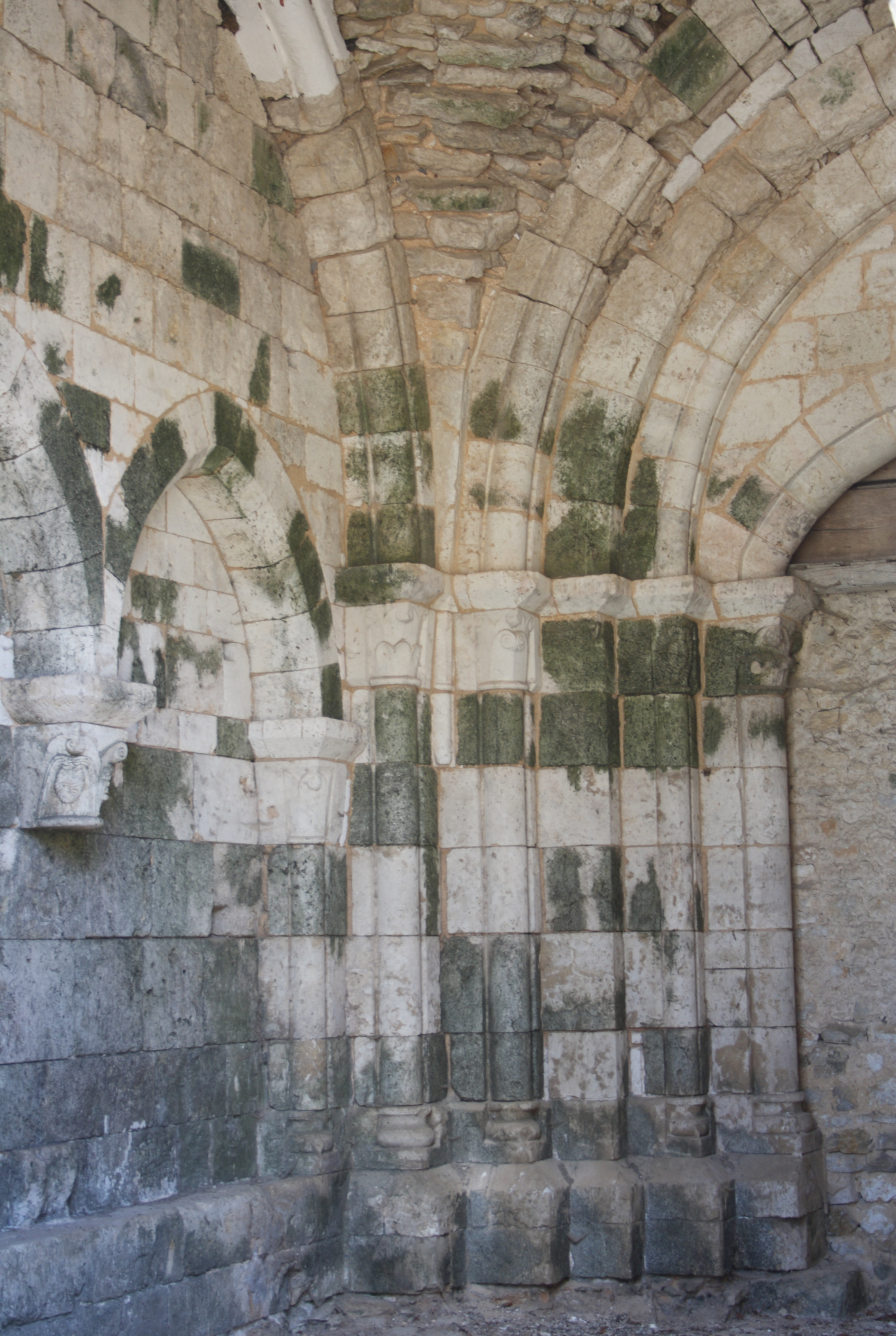 Ehemaliges Priorat Saint-André in Château-Landon, einer Gemeinde im Département Seine-et-Marne (Île-de-France), aus der Mitte des 12. Jahrhunderts